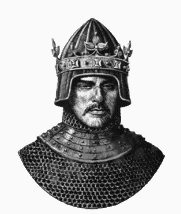 King Géza II of Hungary